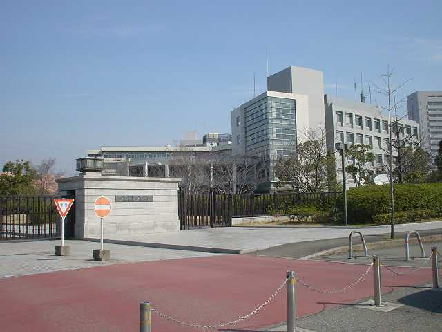 大阪大学 2005年3月撮影